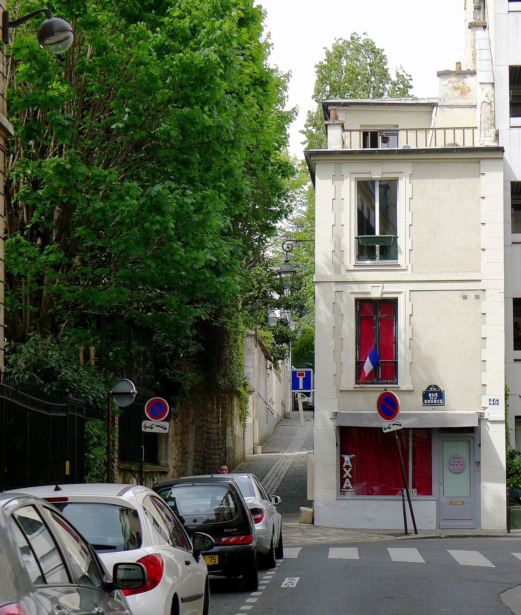 Rue Pierre-Guérin et rue de la Source - Paris XVI